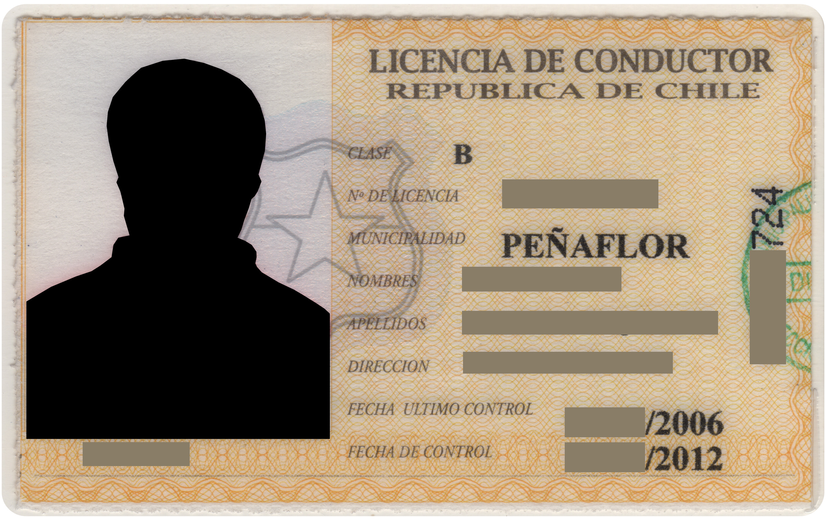 Licencia de conducir de la República de Chile.